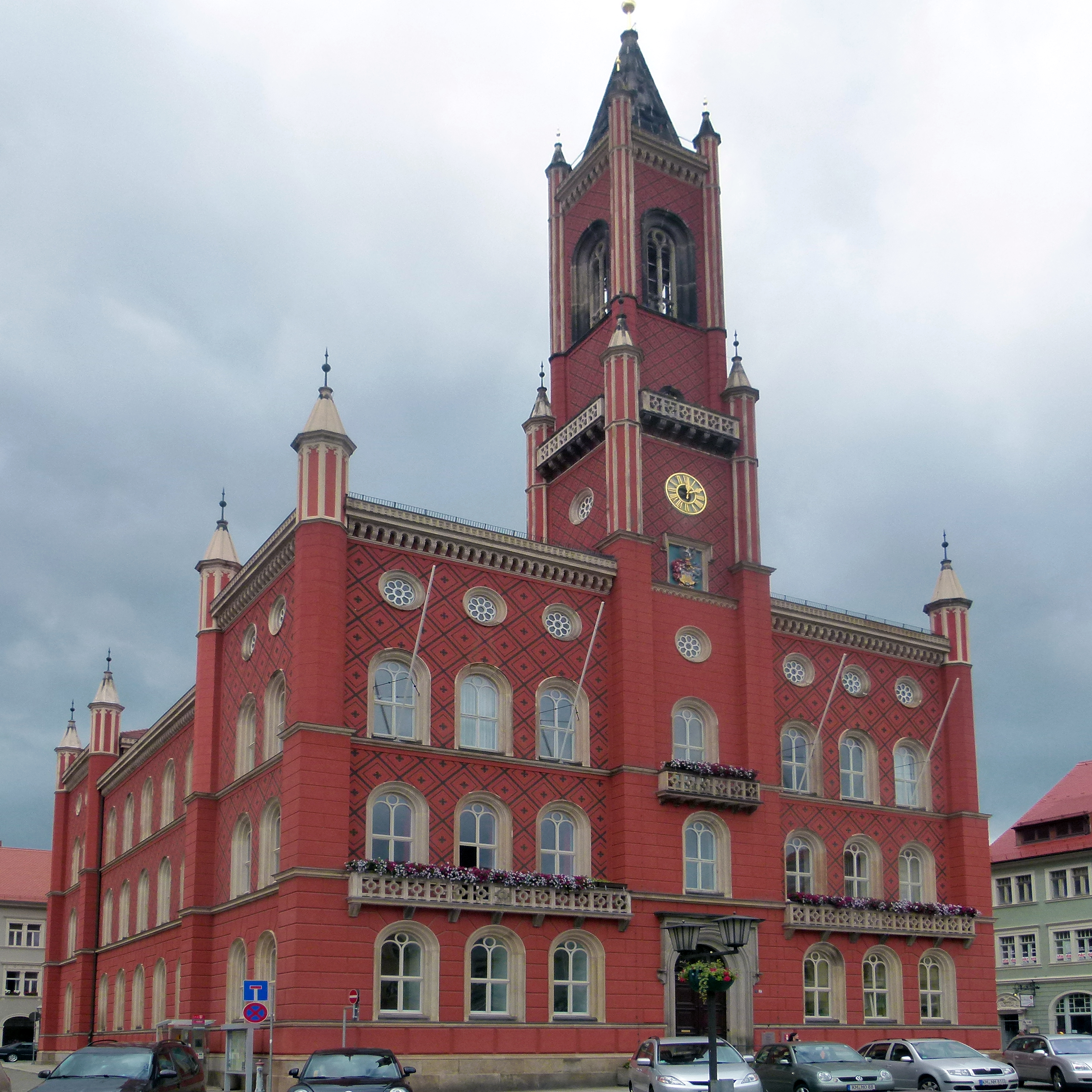 Rathaus von Kamenz, Sachsen